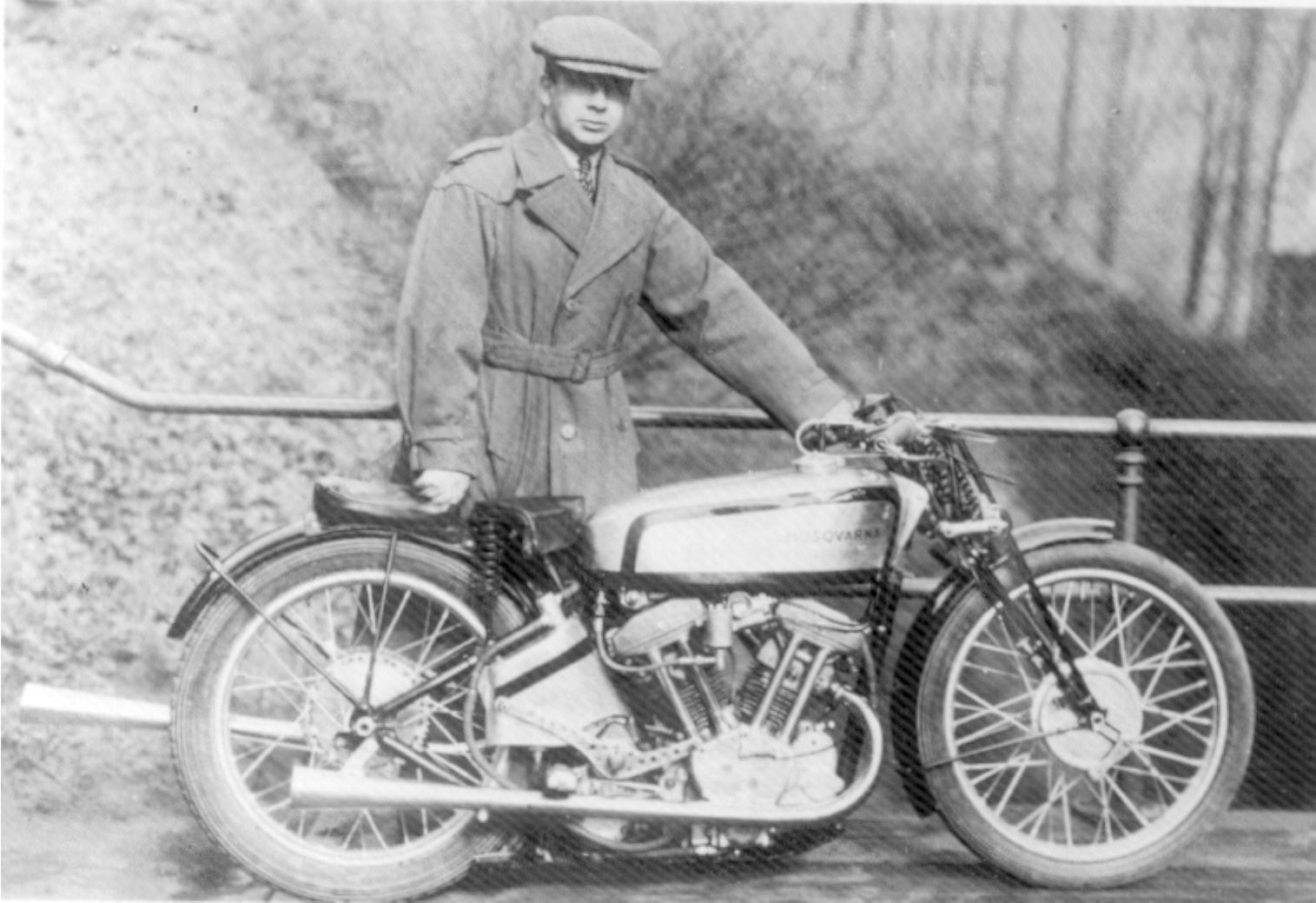 Husqvarna 500 cc racer 1935. Afbeelding is meer dan zestig jaar oud